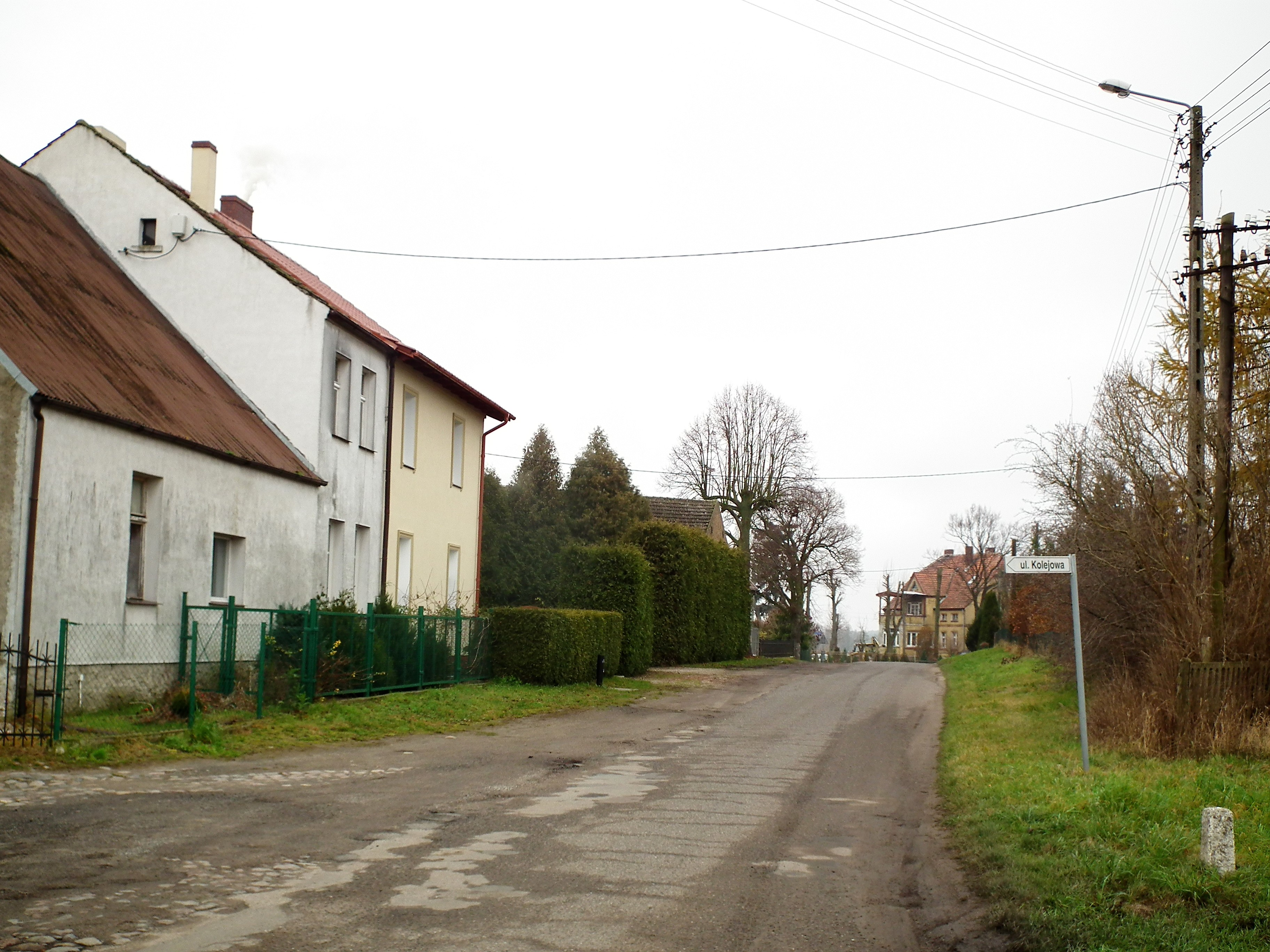 Cychry - fragm.